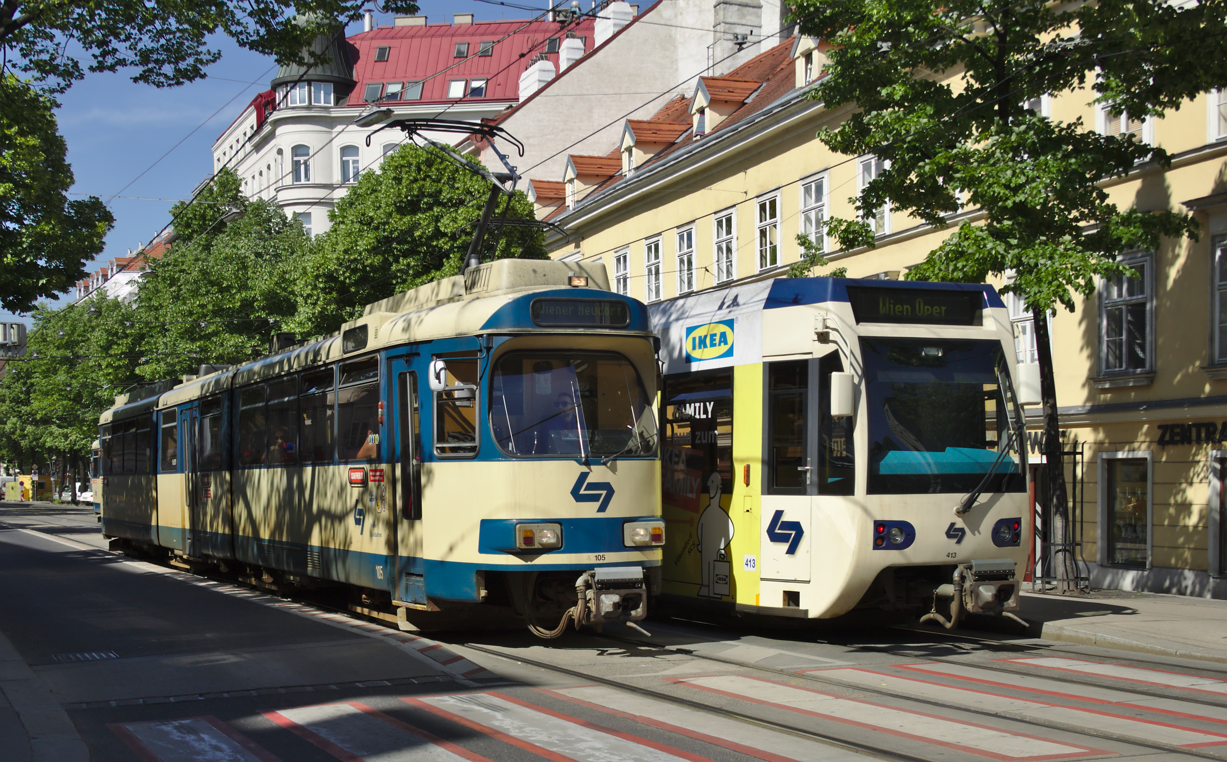 WLB-Triebwagen 105 (Richtung Wiener Neudorf) und 413 (Richtung Wien Oper) nebeneinander in der Haltestelle Mayerhofgasse